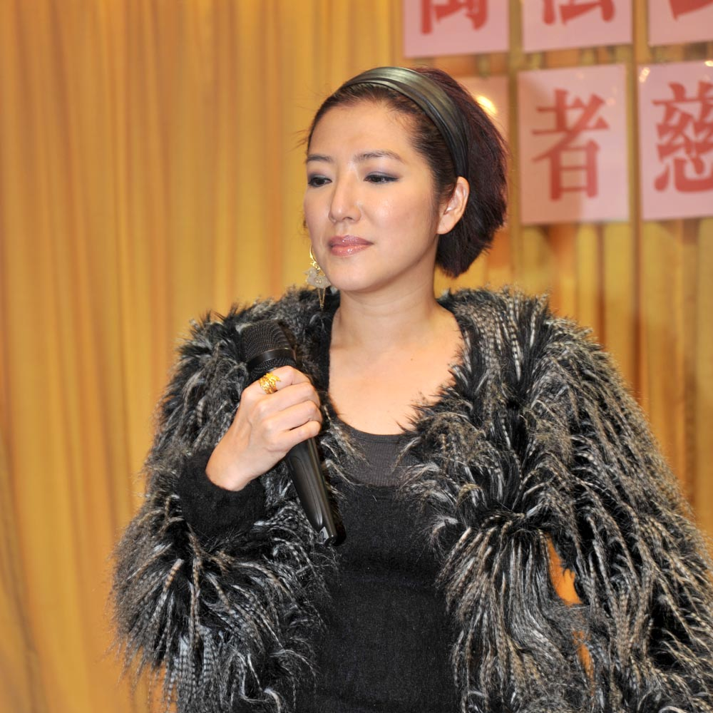 關寶慧 (Emily Kwan)